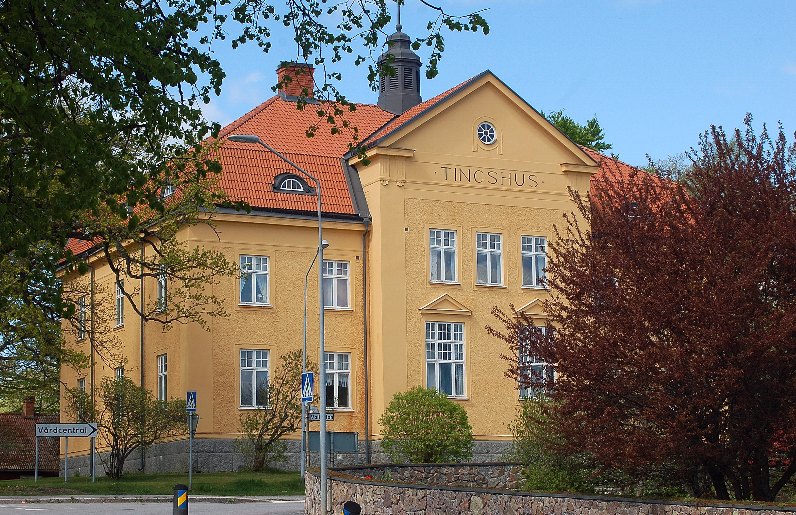 Fjugesta Tingshus.